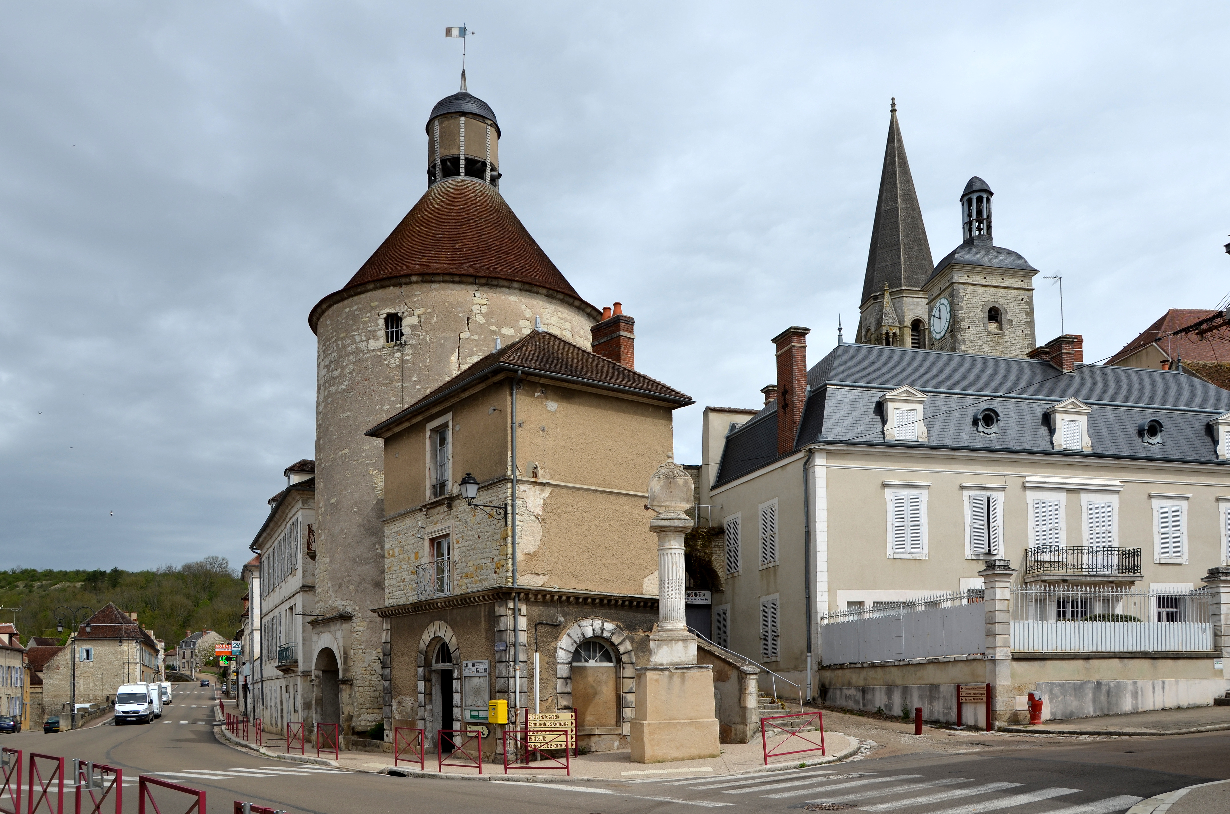 la Tour du Méridien a Vermenton, Yonne, France